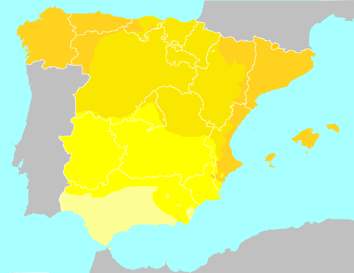 Dialectos del español de España (no se incluye el archipiélago canario). Amarillo anaranjado - Hablas del norte en contacto con otra lengua Amarillo mostaza - Resto de hablas castellanas del norte Amarillo chillón - Hablas de transición del sur Amarillo pálido - Dialecto andaluz